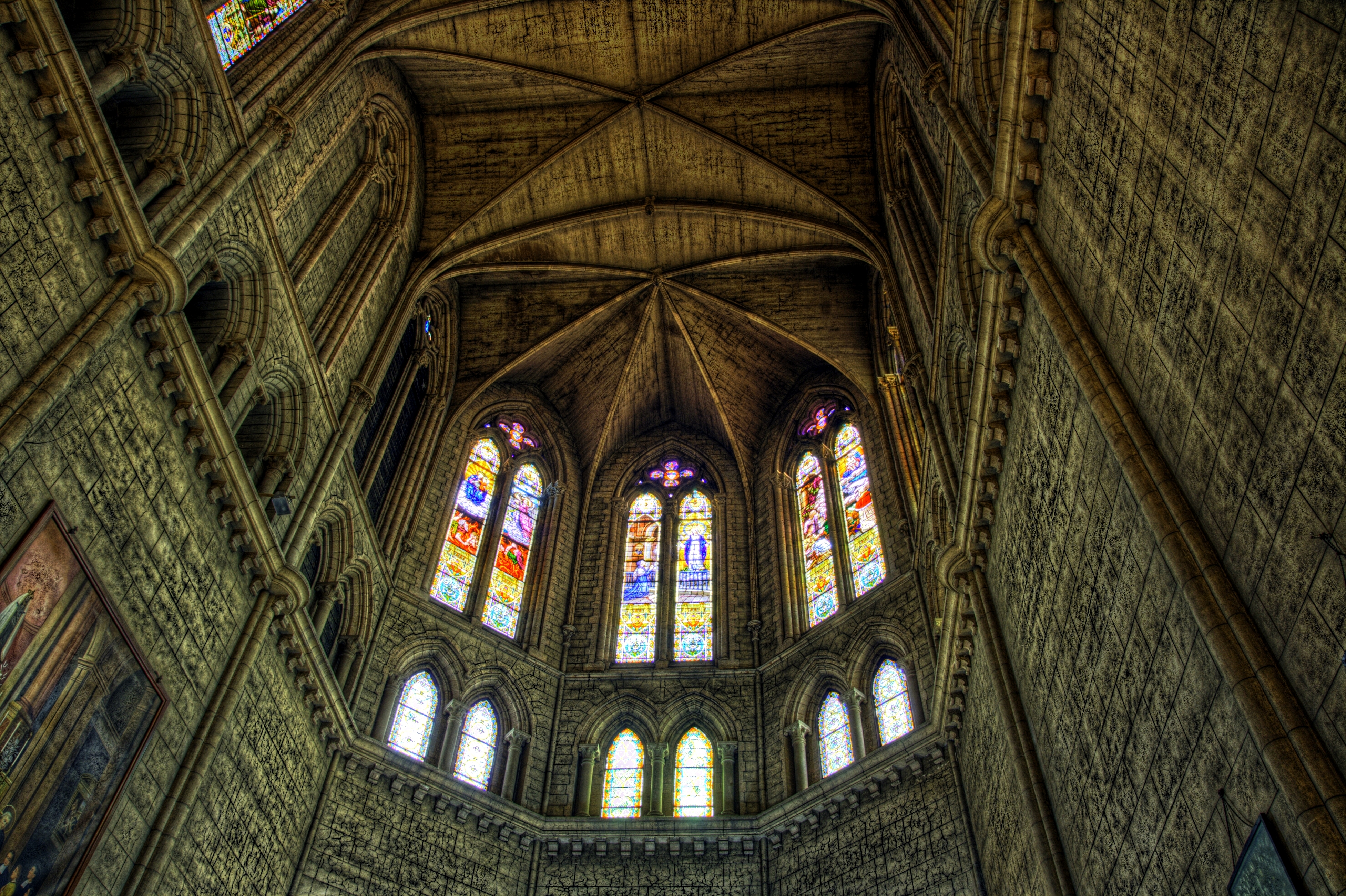 Basílica de Nuestra Señora de Luján, Luján, provincia de Buenos Aires, Argentina.